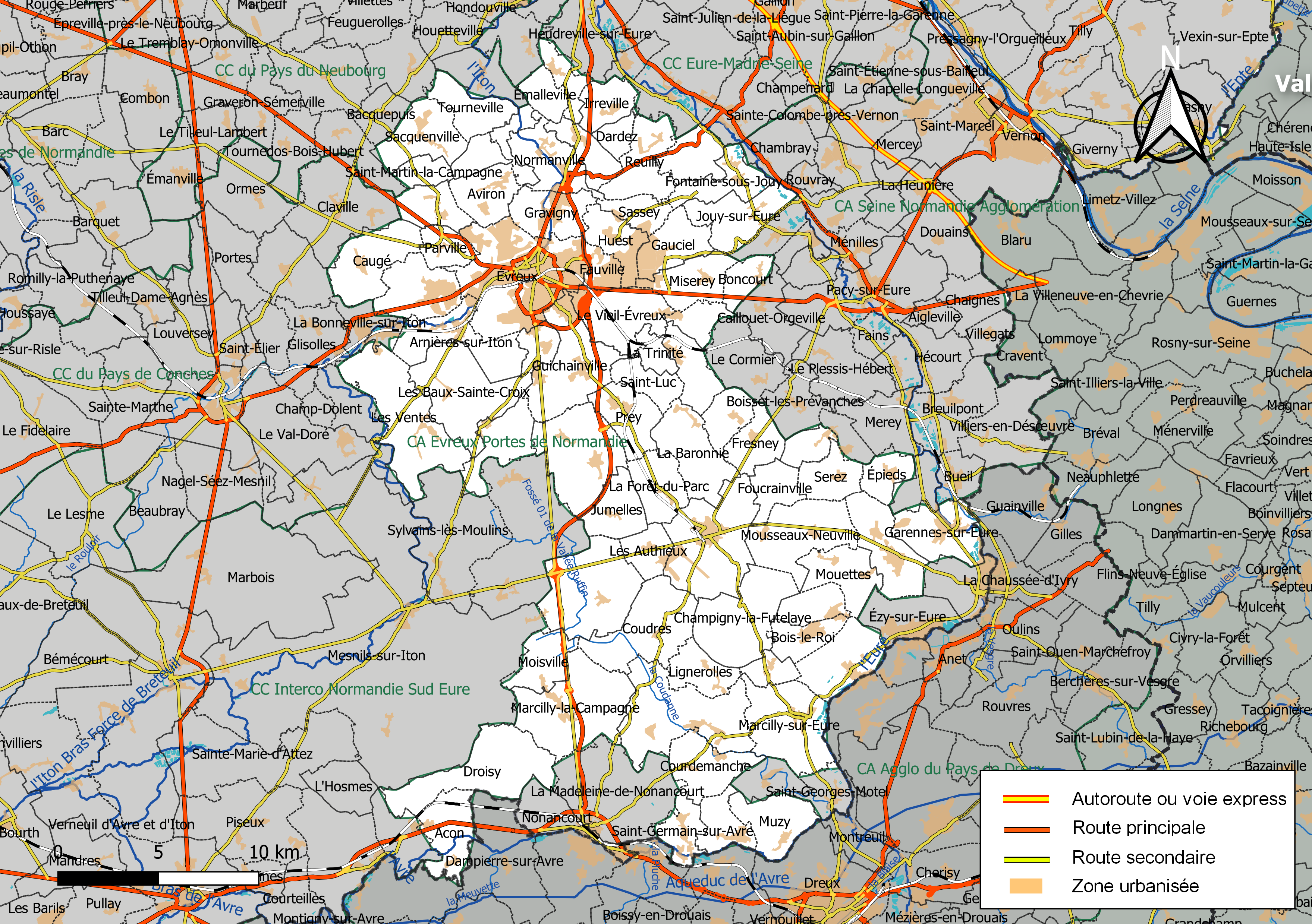 Carte géographique de l'intercommunalité Évreux Portes de Normandie, département de l'Eure, France. Composition au 1er janvier 2019.